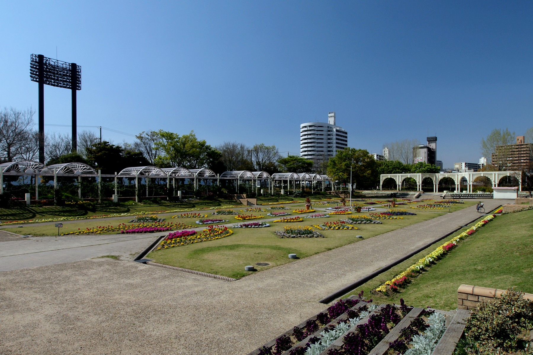 住之江公園 花と緑のスクエア 所在地：大阪府大阪市住之江区南加賀屋